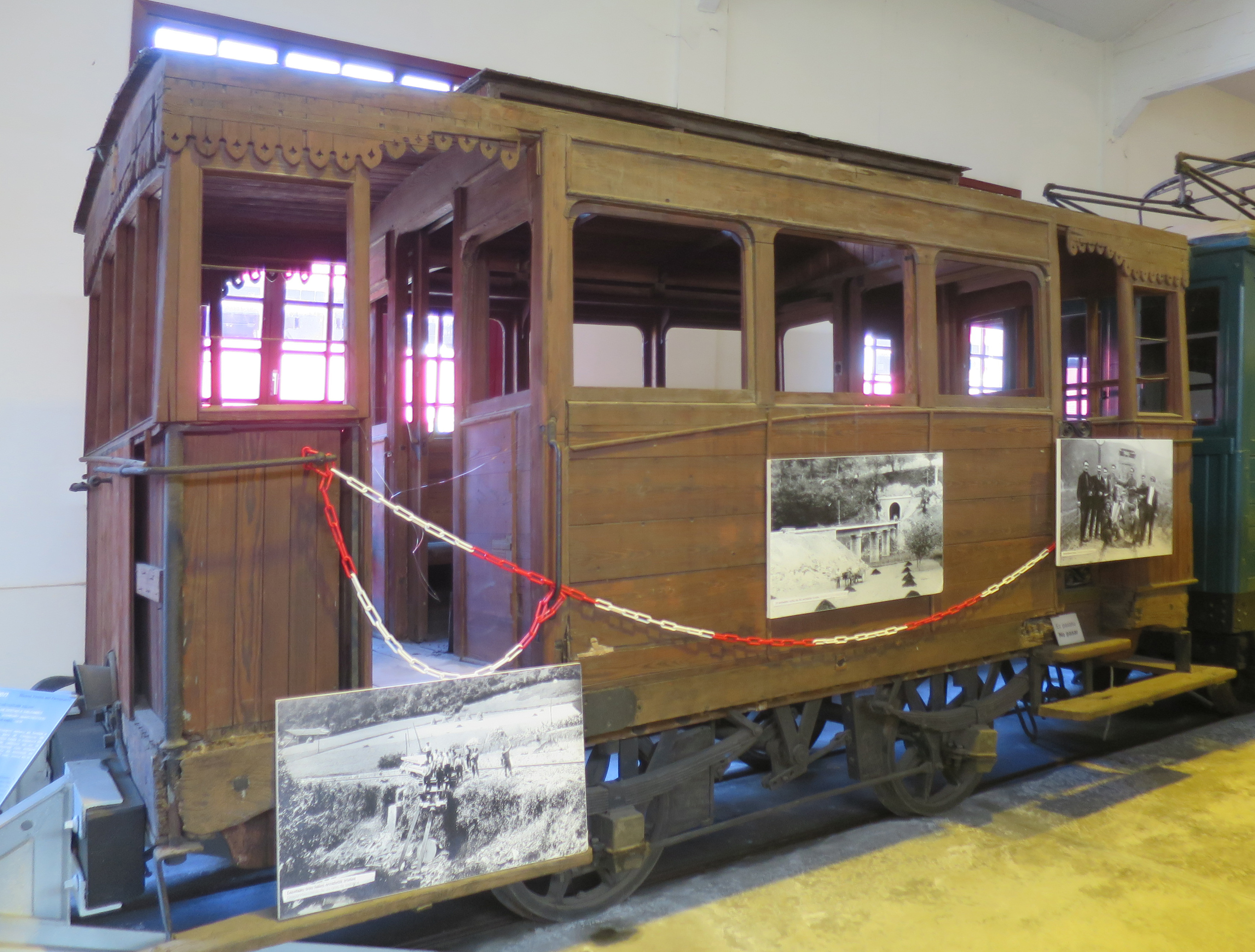 Salonwagen der Sestao—Galdames-Bergwerkseisenbahn (1876)